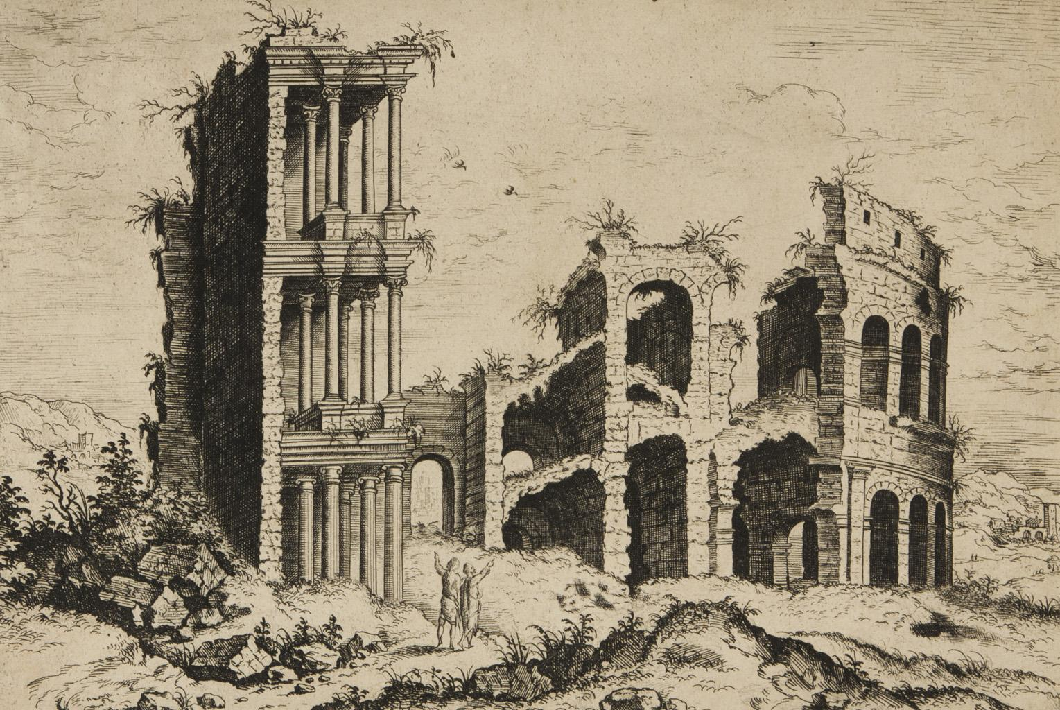 Antike Ruine, im Druckstock bezeichnet: Cock f., Radierung/Papier, 21,5 x 31 cm